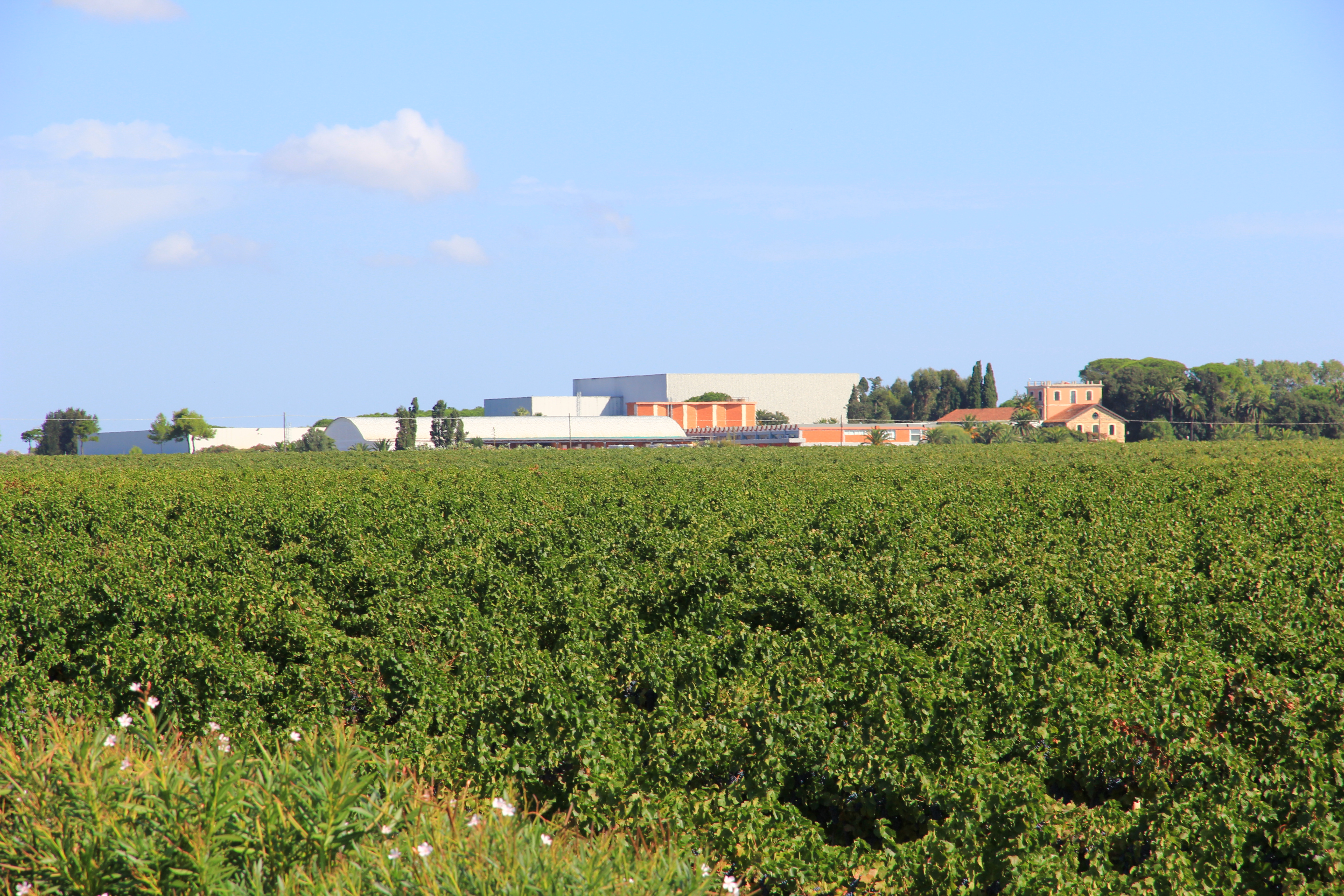 Alghero